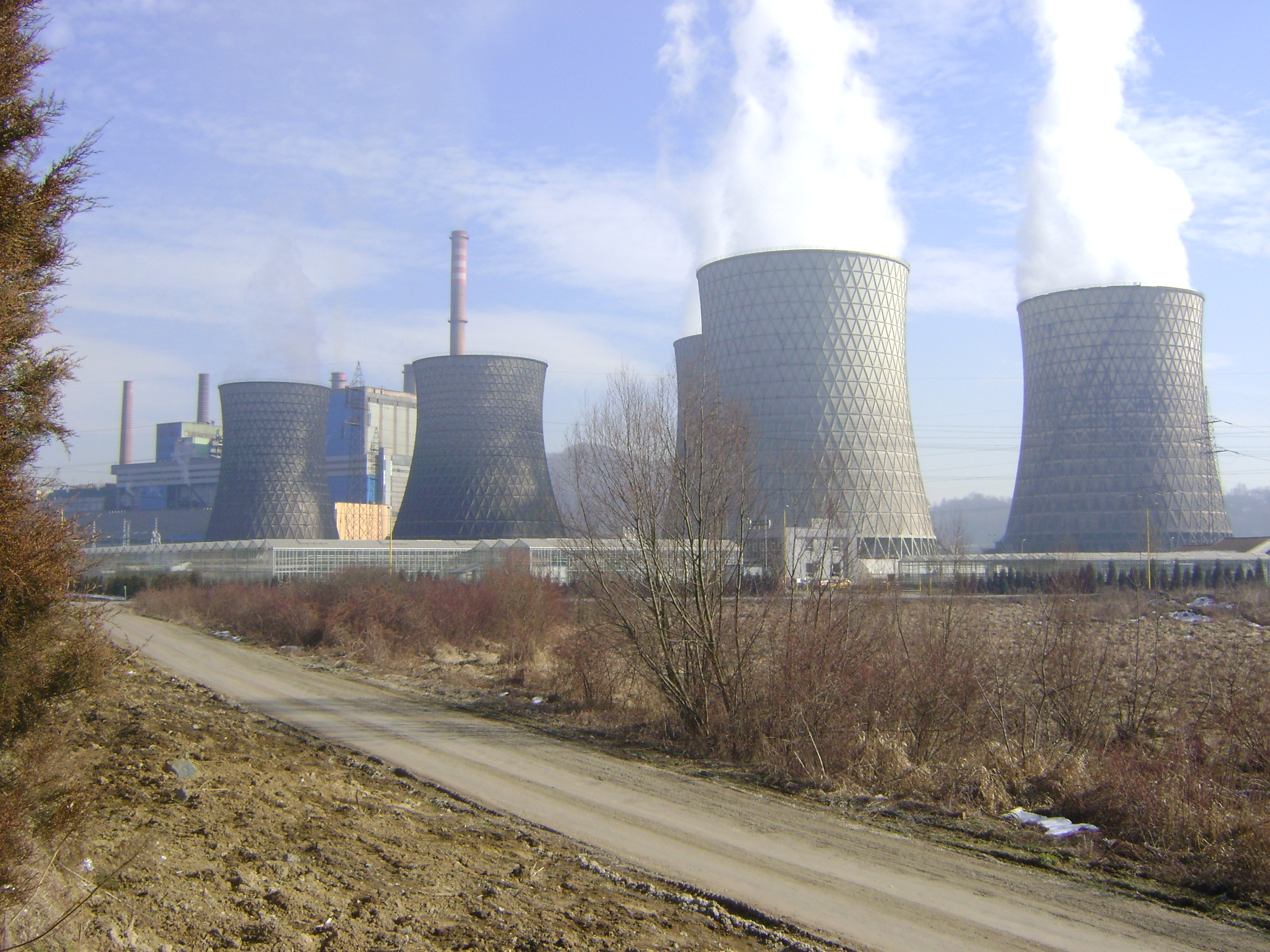 Termoelektrana Tuzla